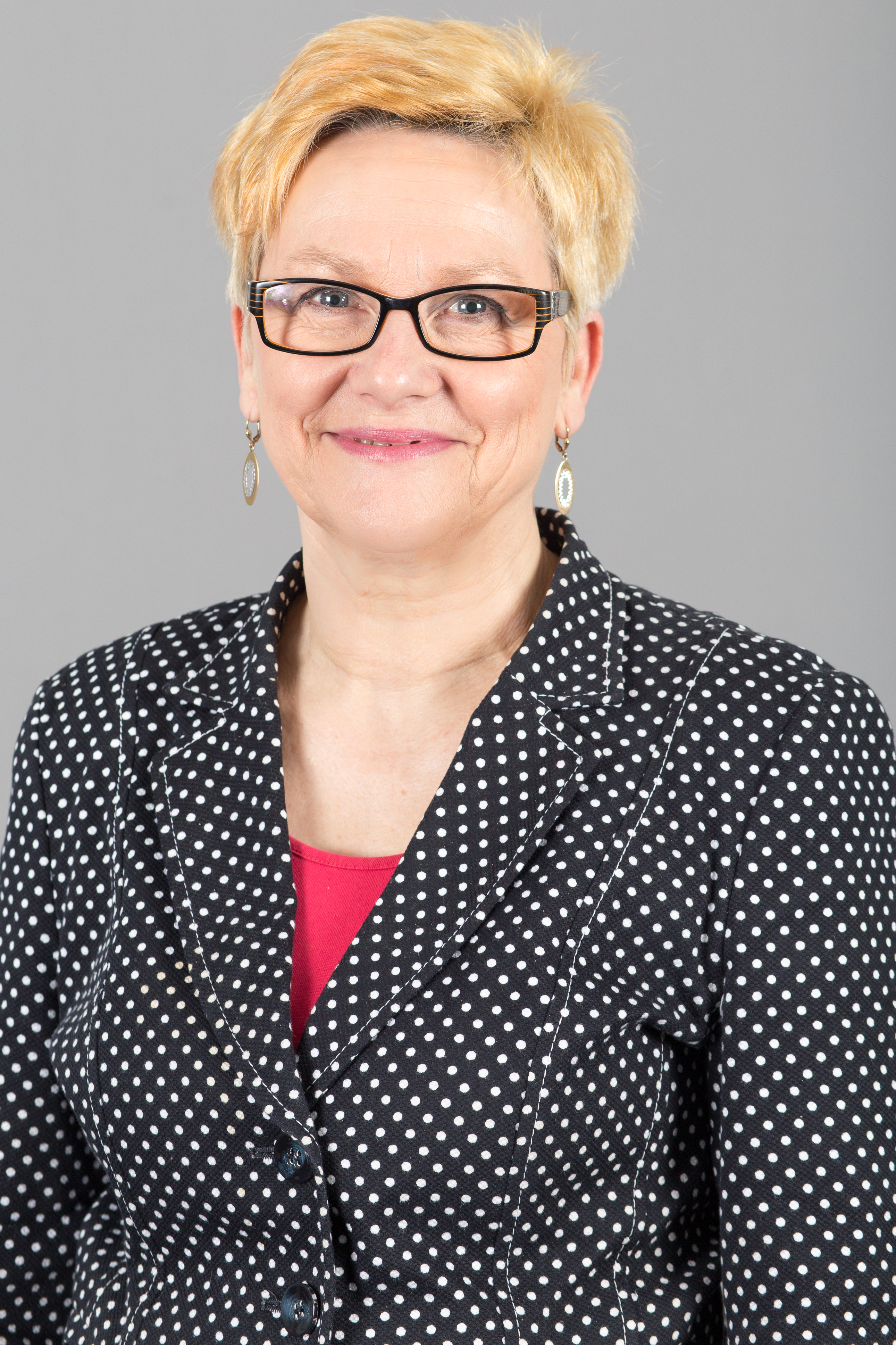 Ina Leukefeld